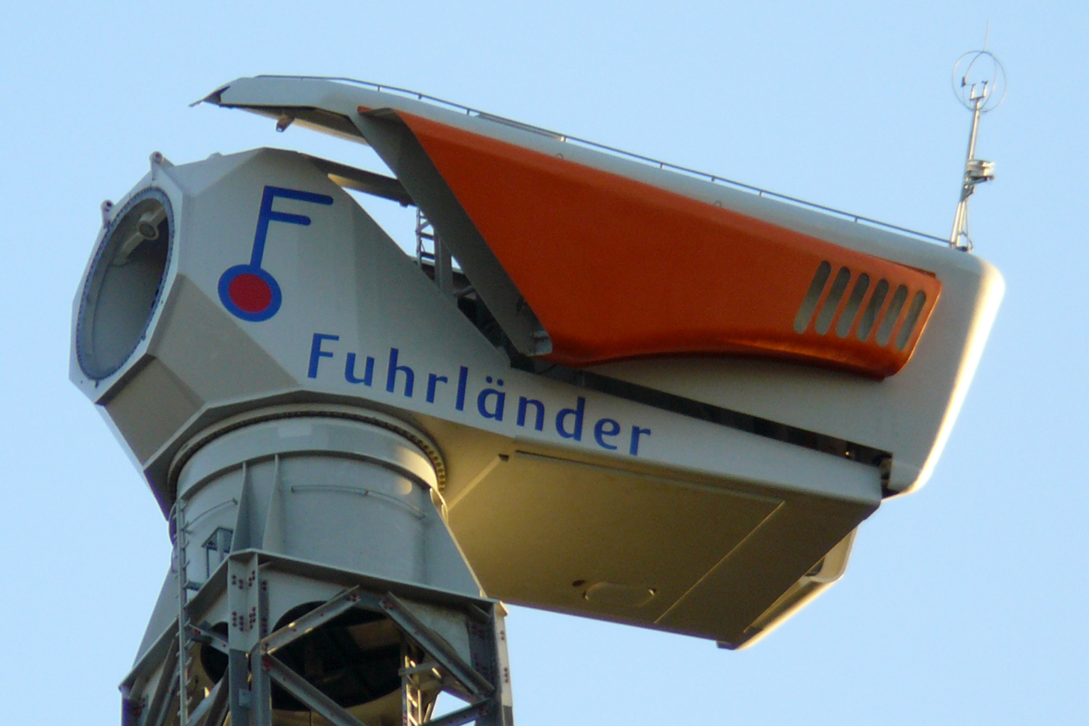 Aufgeklappte Gondel der Fa. Fuhrländer kurz vor der Montage des Rotors (Windpark Spremberg)